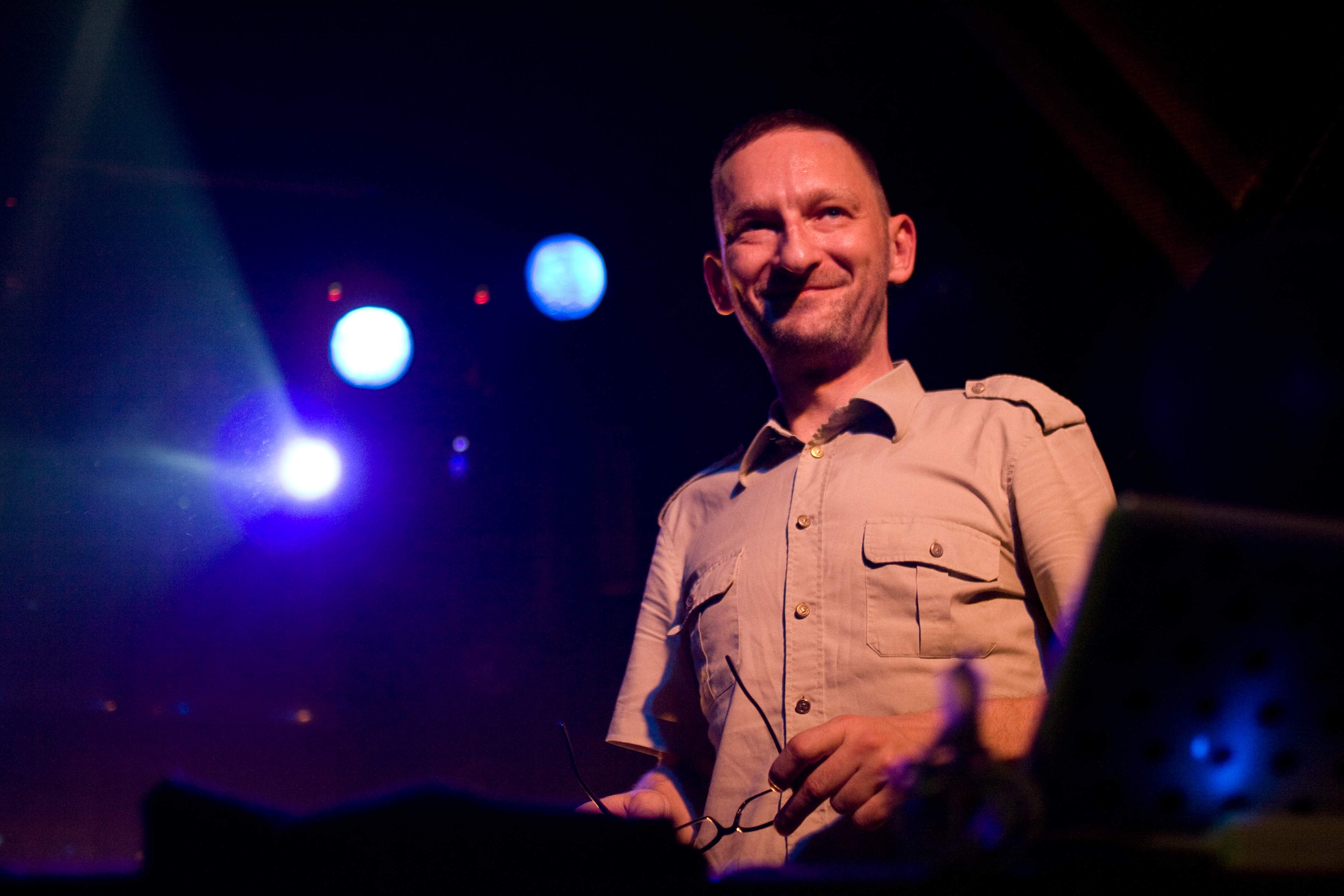 Justus Köhncke bei einem Auftritt in Wien 2009 See where this picture was taken. ?